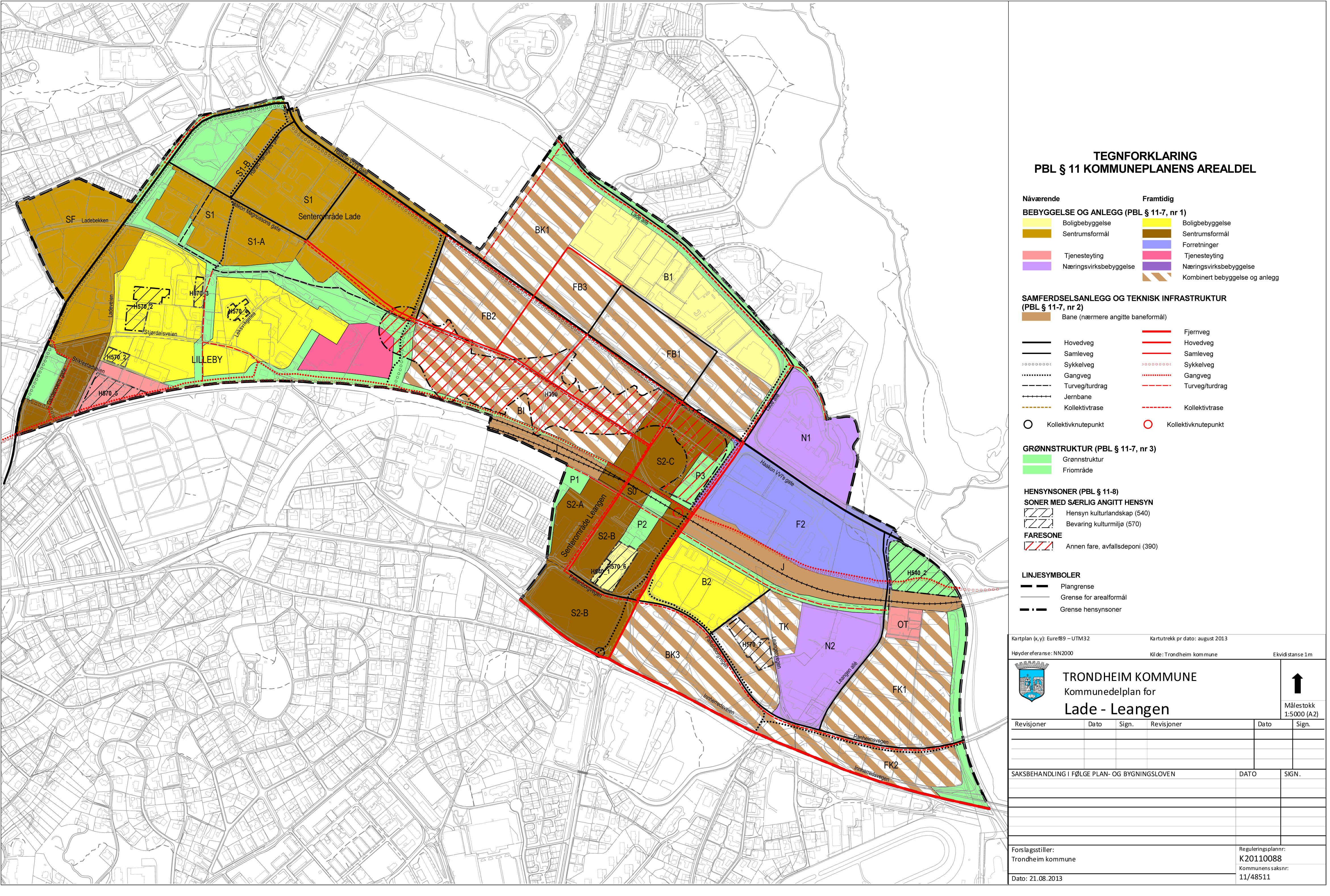 Forslag til kommunedelplan for områdene Lade, Leangen og Rotvoll, Trondheim